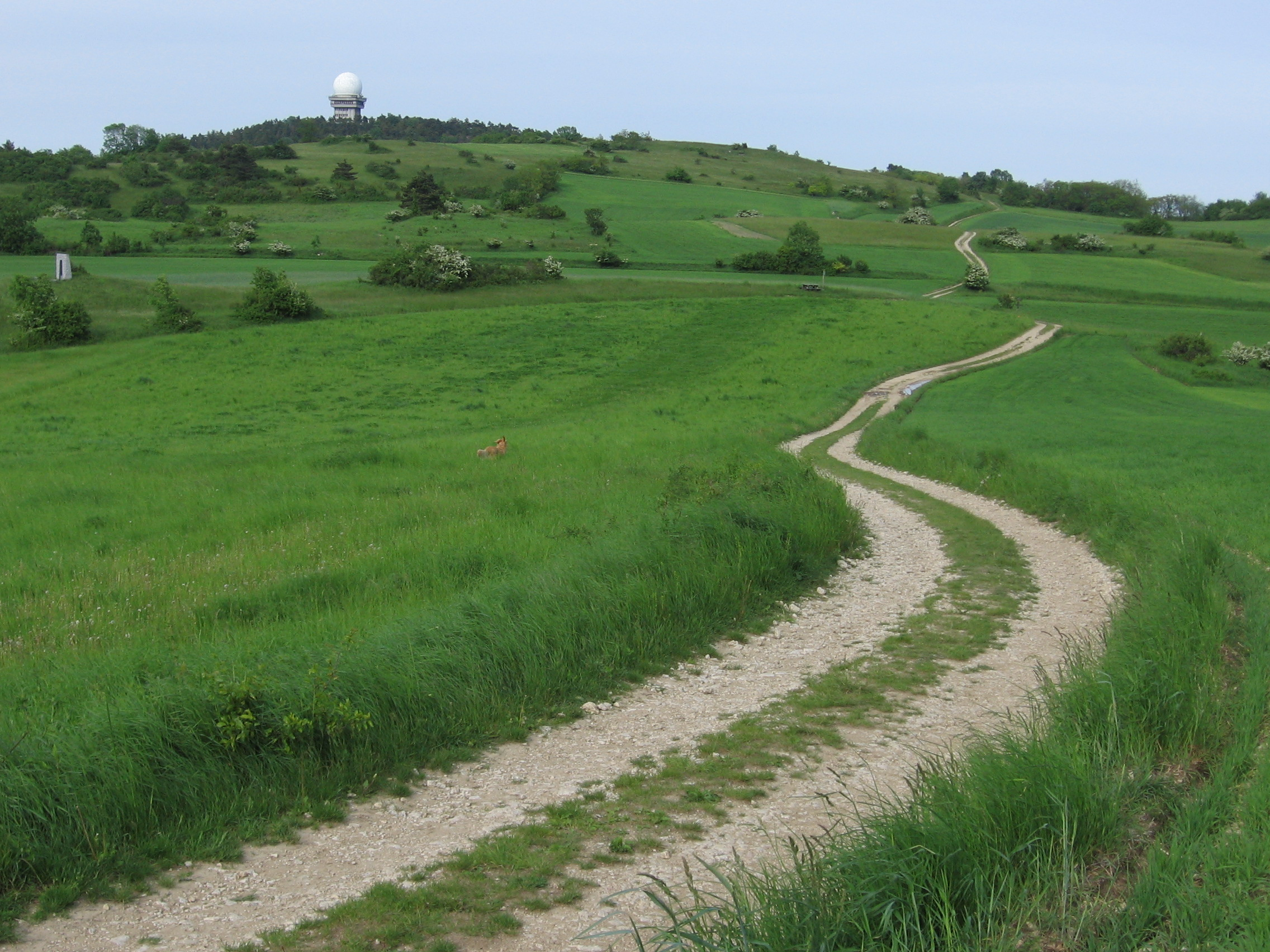 Beschreibung: Buschberg. Quelle: eigene Aufnahme am 20. Mai 2006 Fotograf: Roman Klementschitz, Wien (= Einer flog zu Weit)